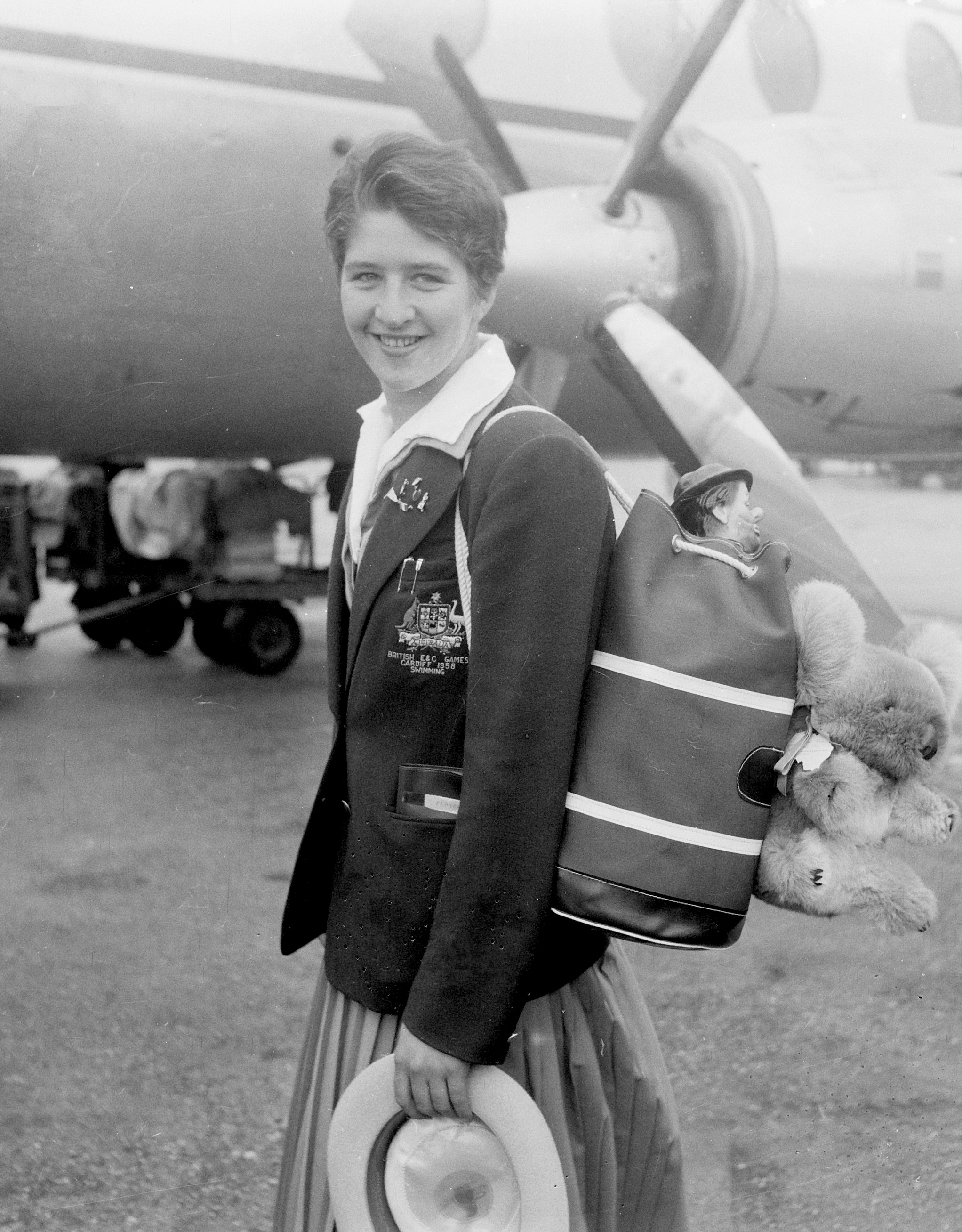 Aankomst Australische zwemploeg op Schiphol, Dawn Fraser met rugzak en talisman